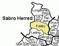 Kort der viser Foldby Sogn, Sabro Herred, Århus Amt, Denmark.